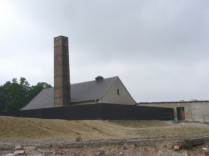 Buchenwald, crematorium. Eigen foto Mark Voorendt, augustus 2004